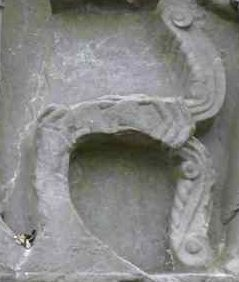 "Irminsul", Detail des Kreuzabnahmerelief an den Externsteinen